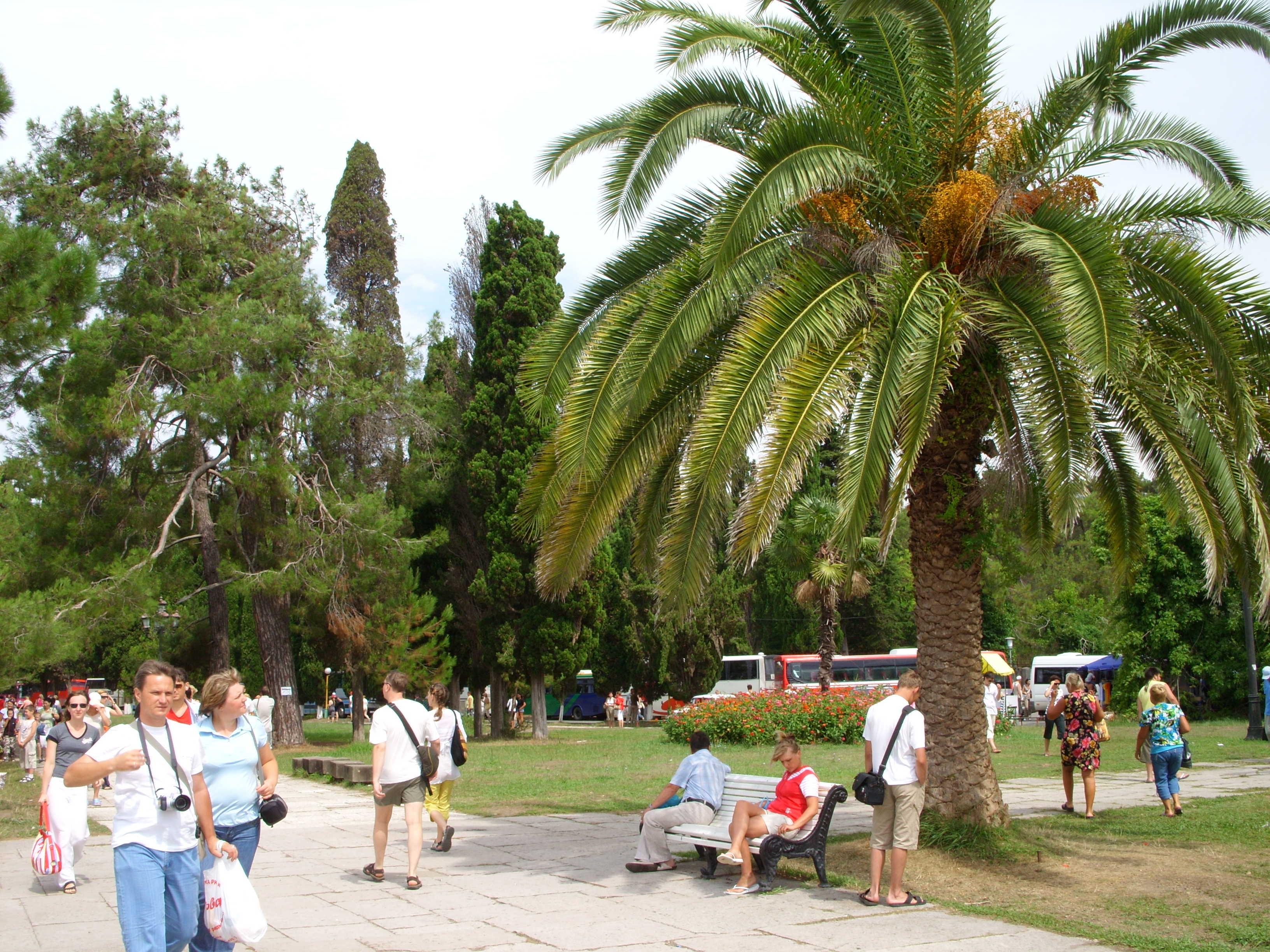 Снимок июля 2009 г. Автобусная экскурсия из Сочи